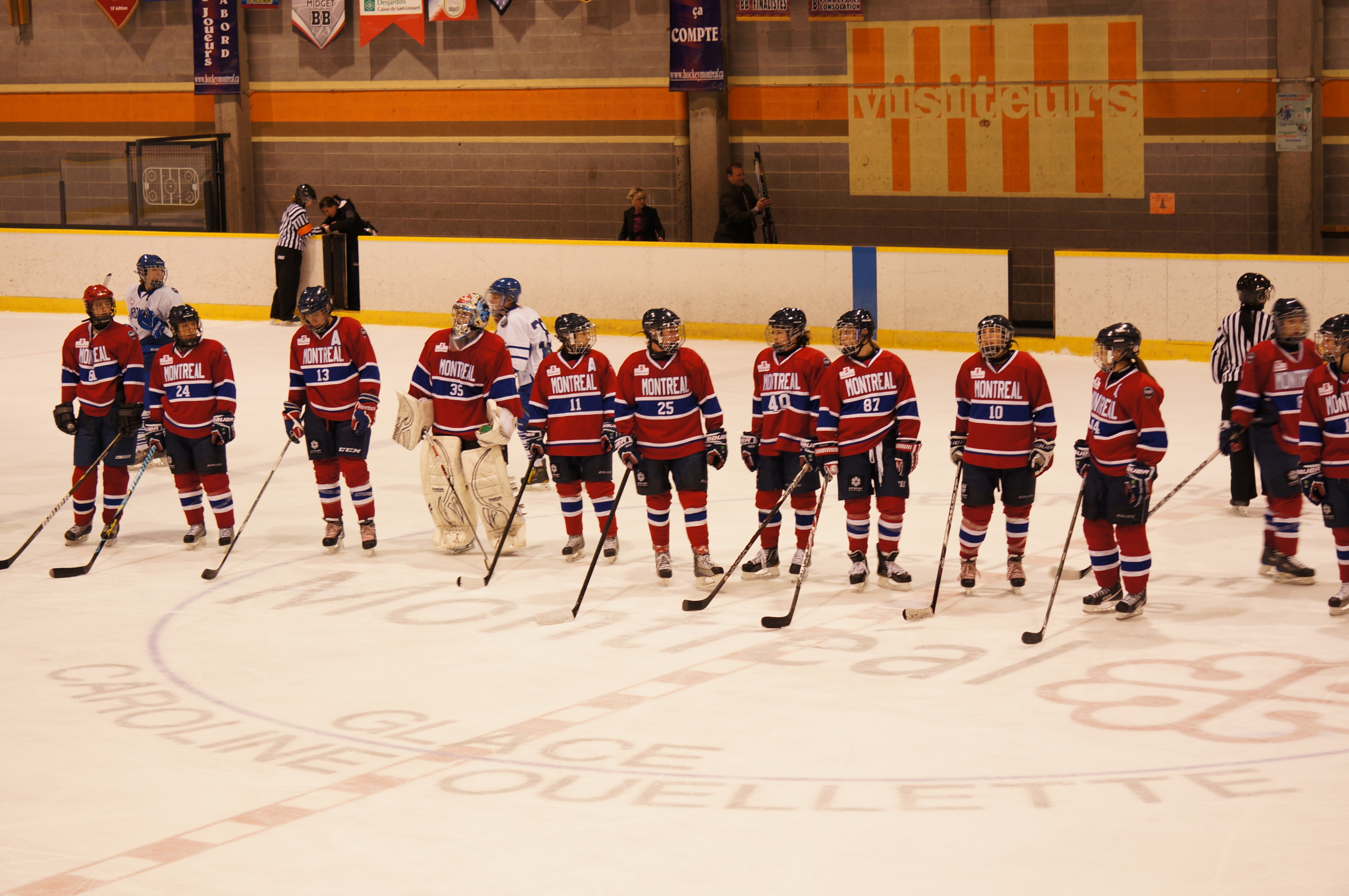 hockey féminin